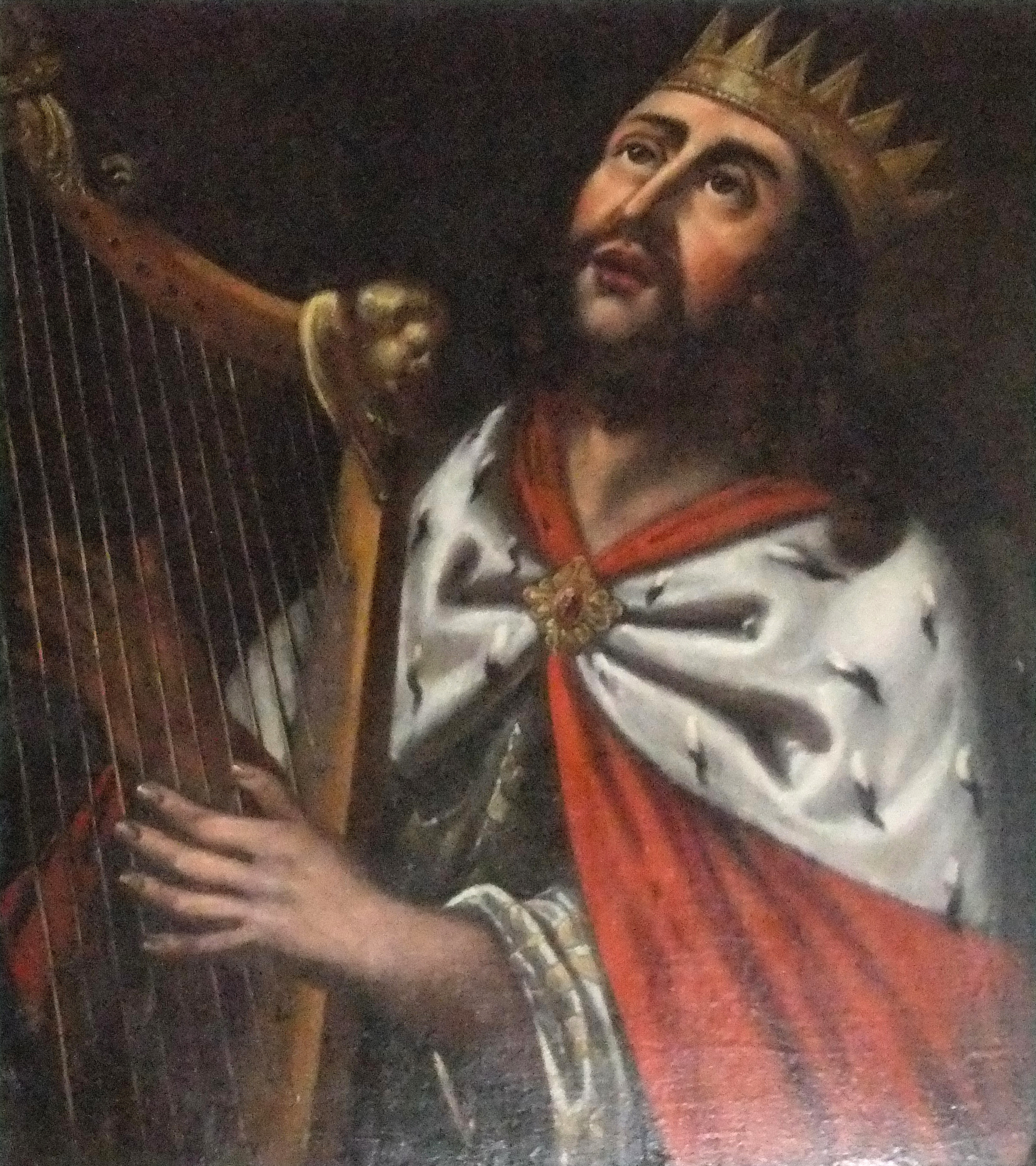 Empore Wolfschlugen. 11: König David spielt Harfe